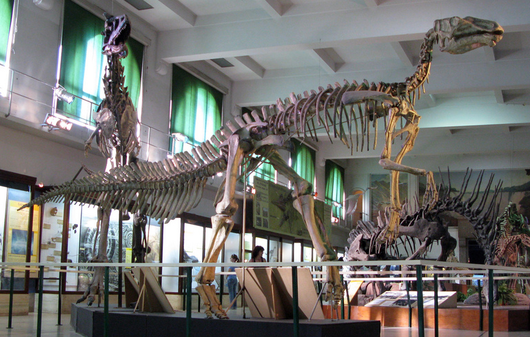 Kritosaurus australis (Secernosaurus), Museo de Ciencias Naturales. CRISIS & REPRESENTACION (19 / 20 Diciembre 2011). Idea / Coordinación Loreto Garin Guzman + Federico Zukerfeld “Celebrando la caída de los Tiranosaurios” Performance con bandera en árabe-español: QUE SE VAYAN TODOS! En medio de dinosaurios y reliquias arqueológicas al interior de las galerías del Museo de Ciencias Naturales, celebramos la caída de los Tiranosaurio. A través de un picnic de conversación antropofágica, buscando interpretaciones y miradas comunes acerca de las transformaciones de los discursos y narrativas. Fotografía:Mathijs de Bruijne.